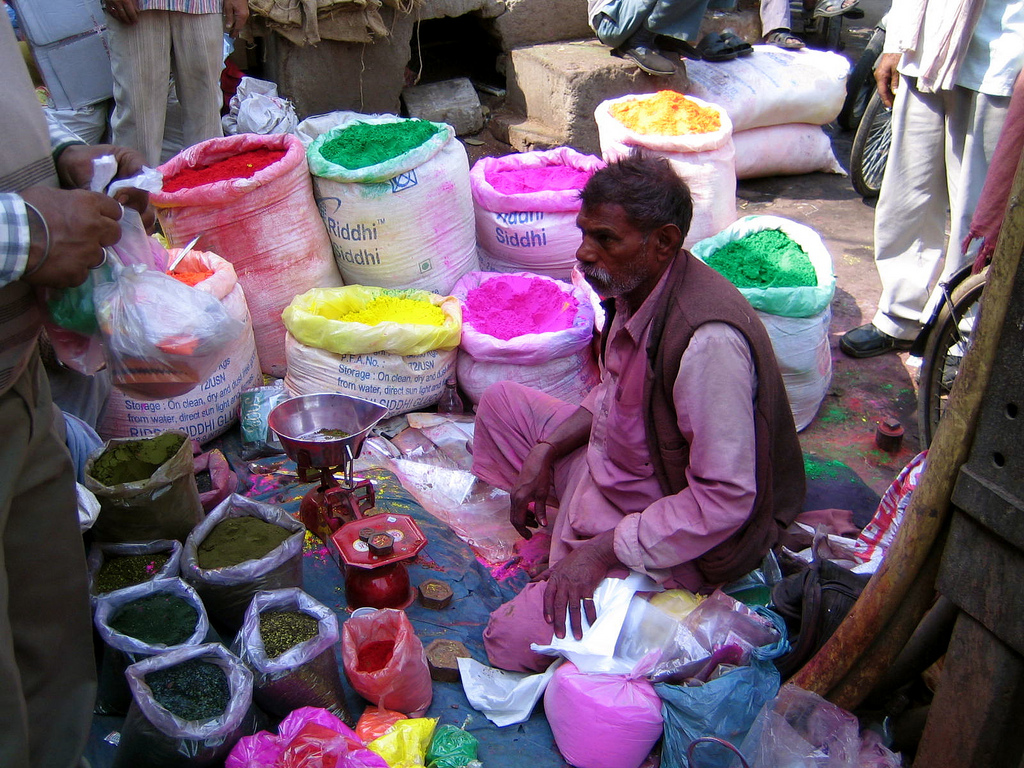 Old Delhi